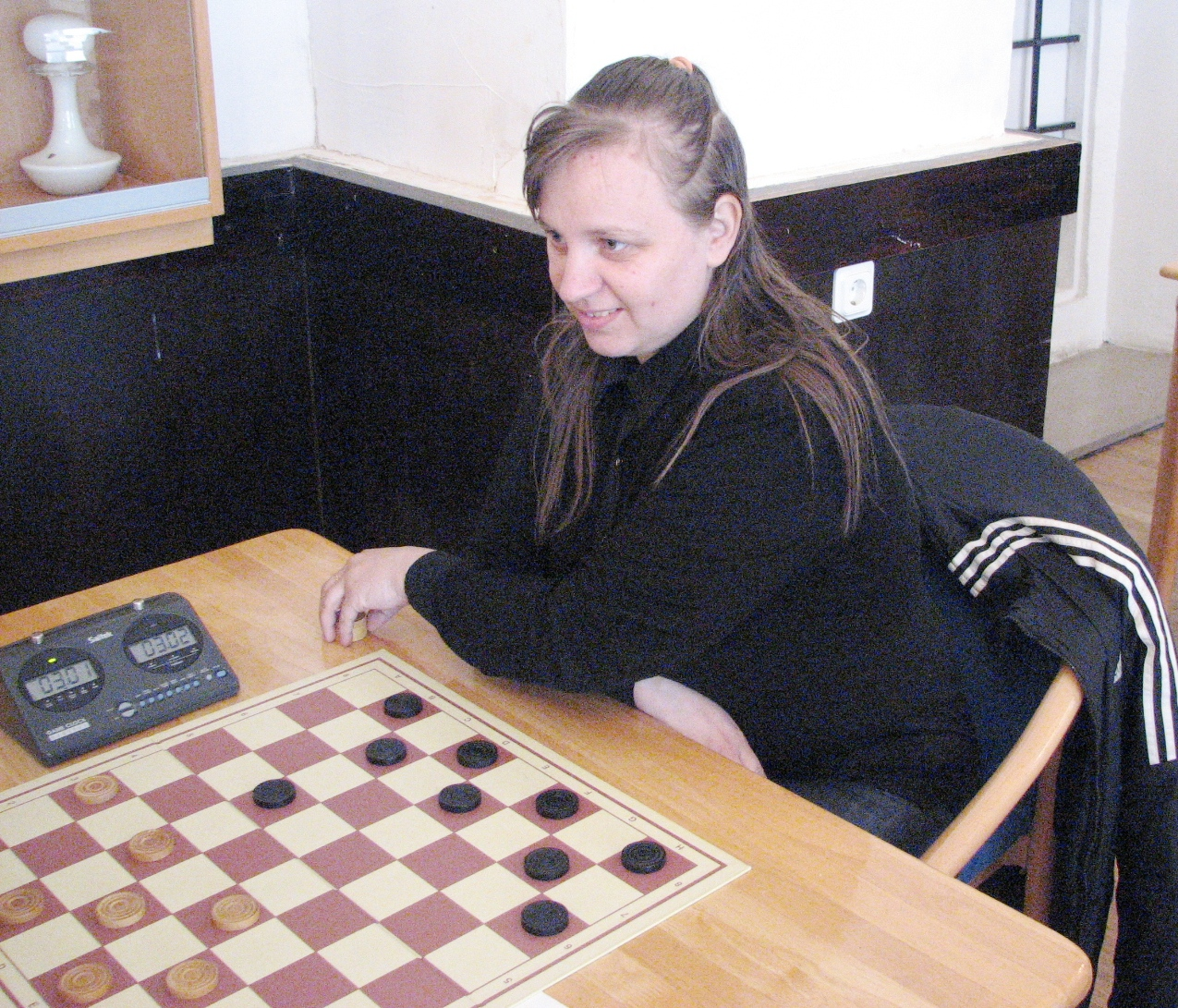 Janne Mumme mängimas Eesti välkkabe meistrivõistlustel